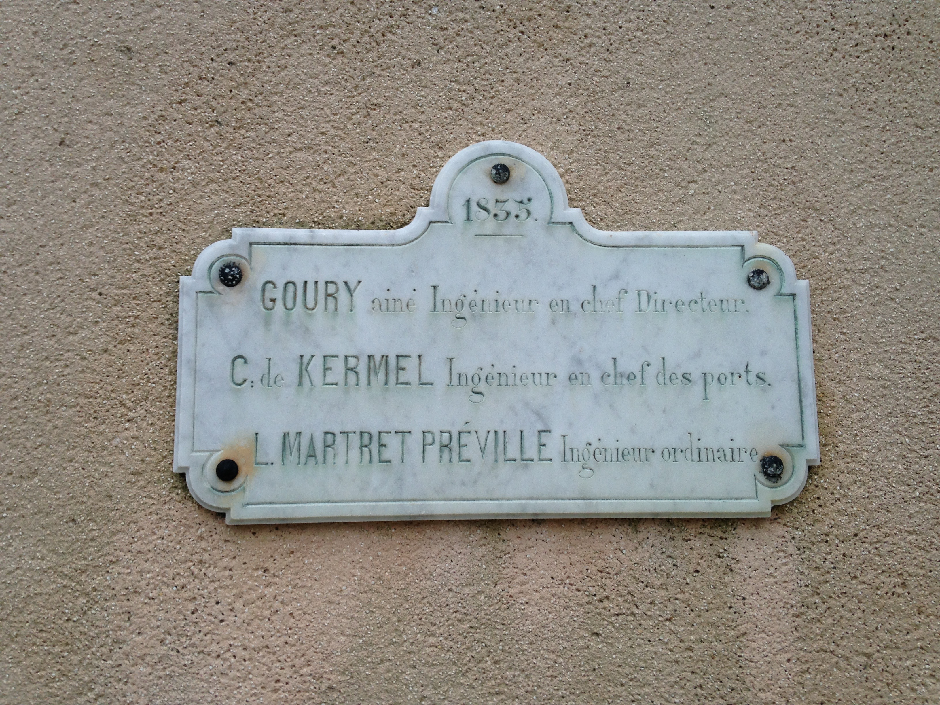 Plaque